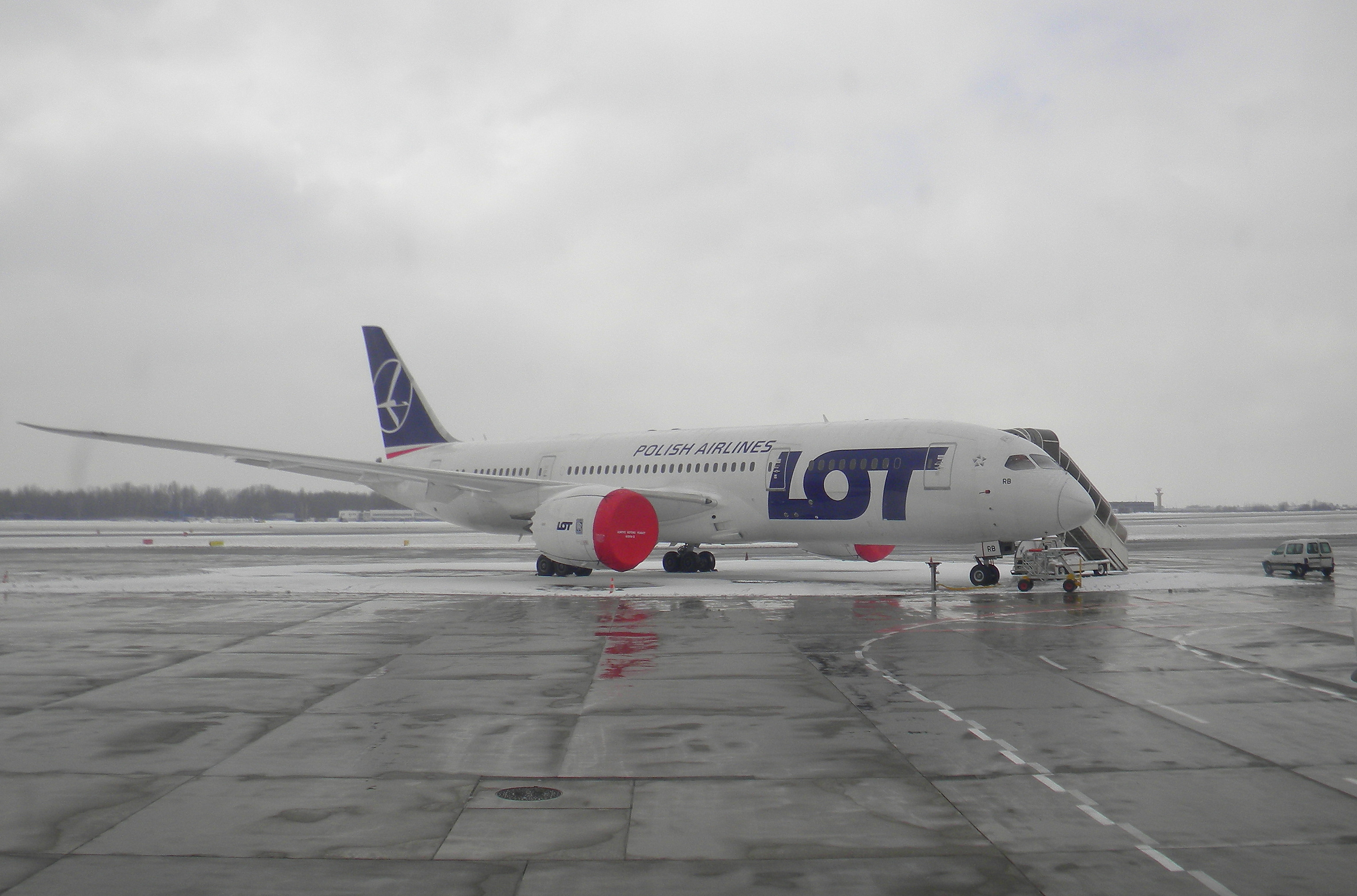 SP-LRB stoi na płycie Okęcia i czeka na lepsze czasy